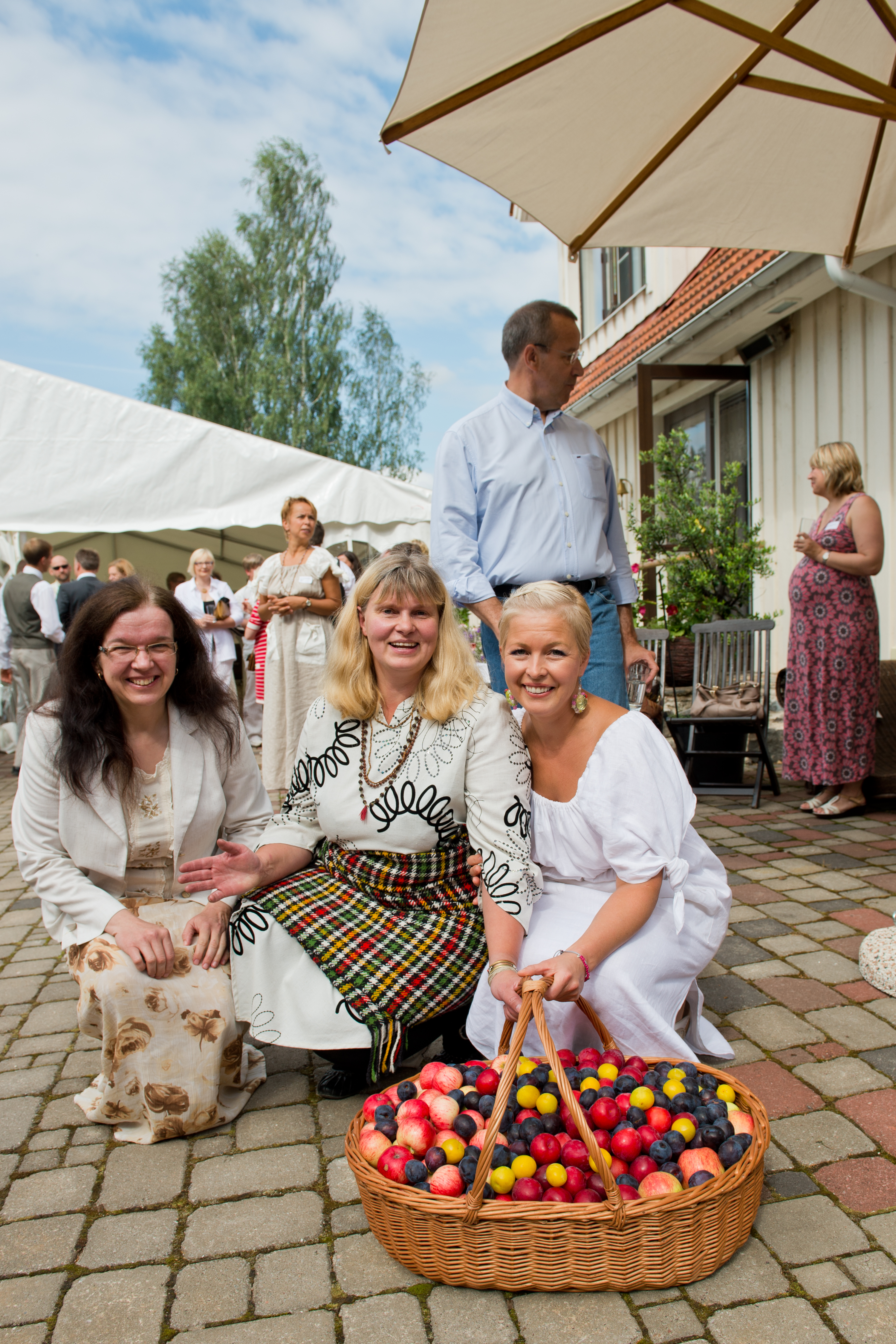 Ave Kikas ja Pille Põllumäe Eesti Maaülikooli Põllumajandus- ja Keskkonnainstituudi Polli Aiandusuuringute Keskusest koos Evelin Ilvesega